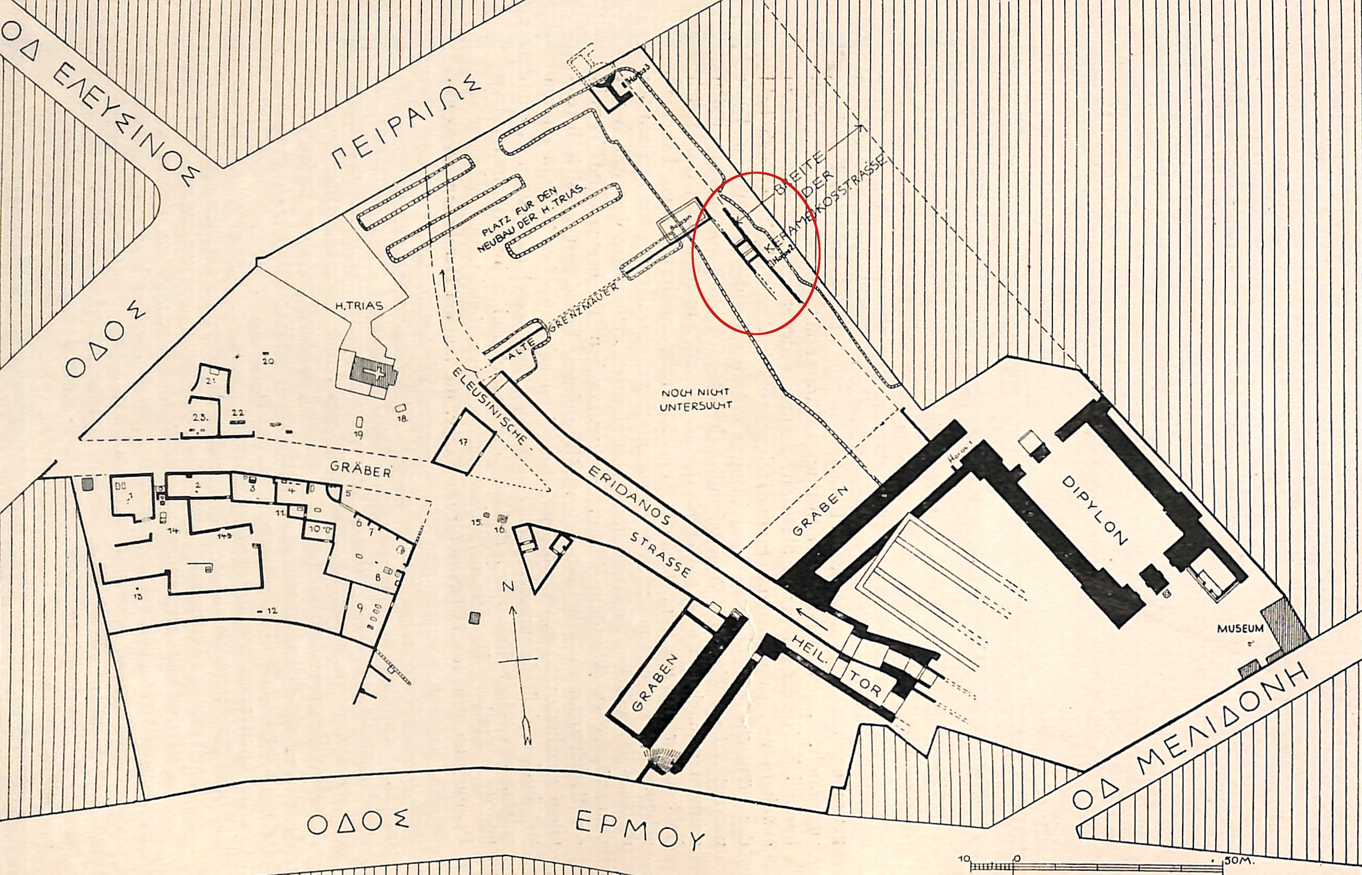 Plan des Ausgrabungsgeländes auf dem Kerameikos nach Stand von 1915, markiert ist das Lakedaimoniergrab